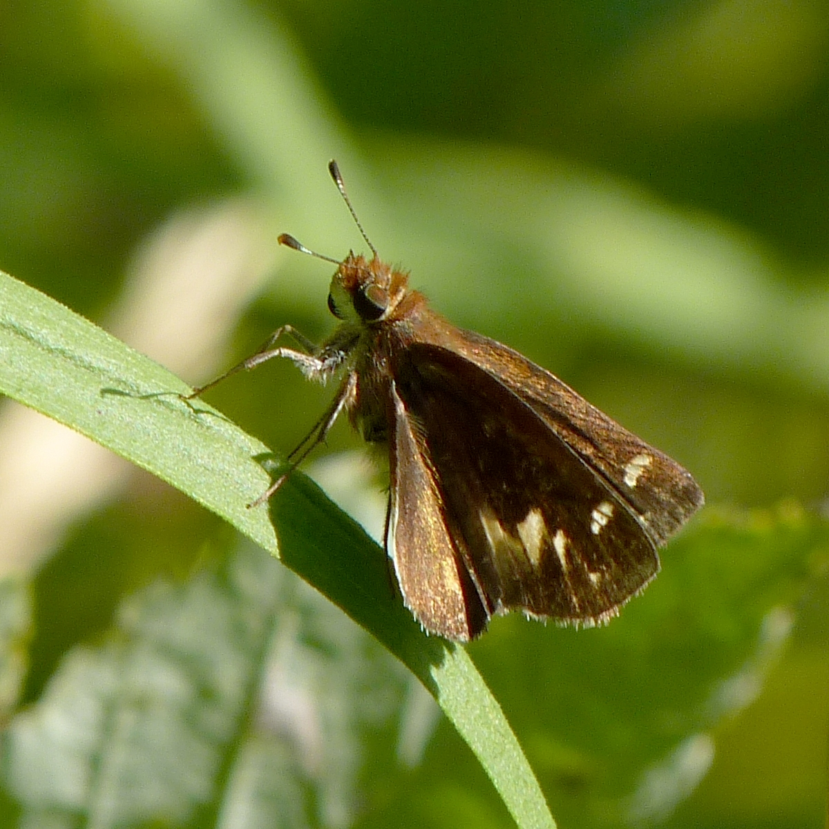 Pompeius verna